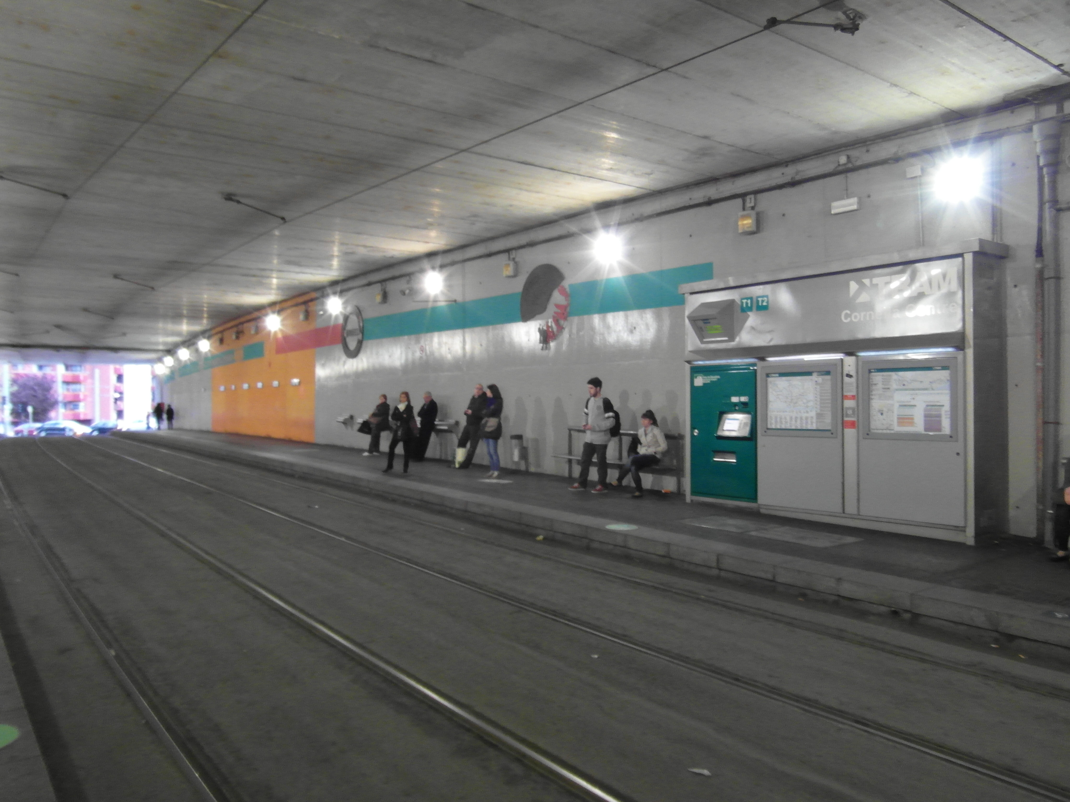 Barcelona - Trambaix